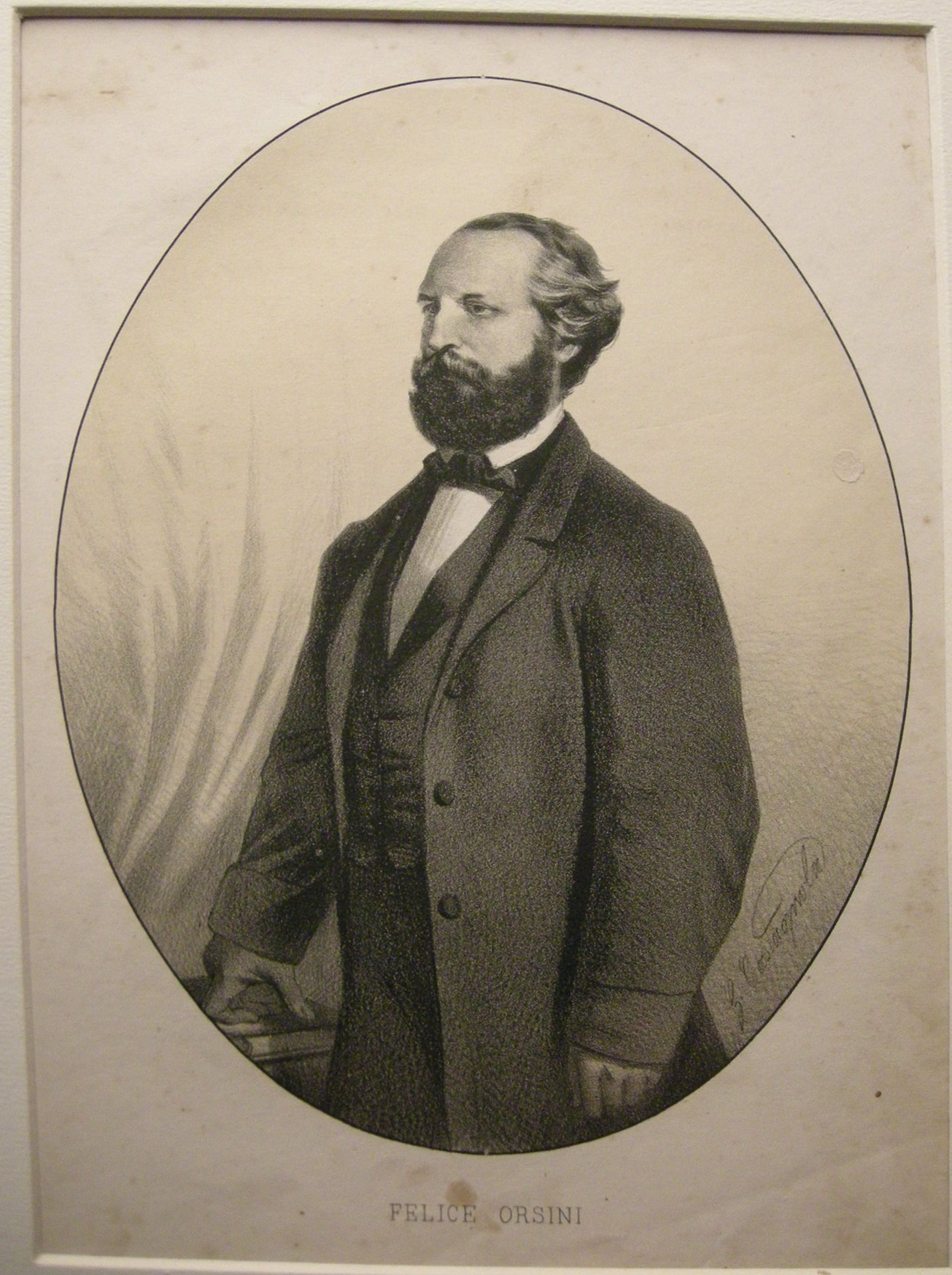 Litografia ballagny, fine XIX sec. felice orsini